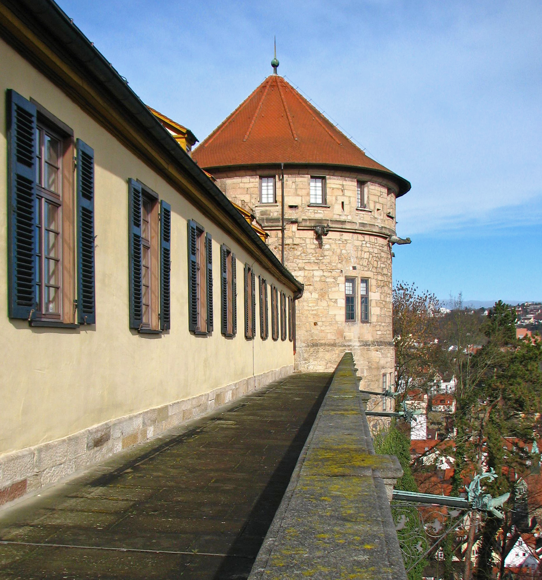 Nordostturm von Schloss Hohentübingen, Fundamentalpunkt der Württembergischen Landesvermessung ab 1818 (Blick von Süden)